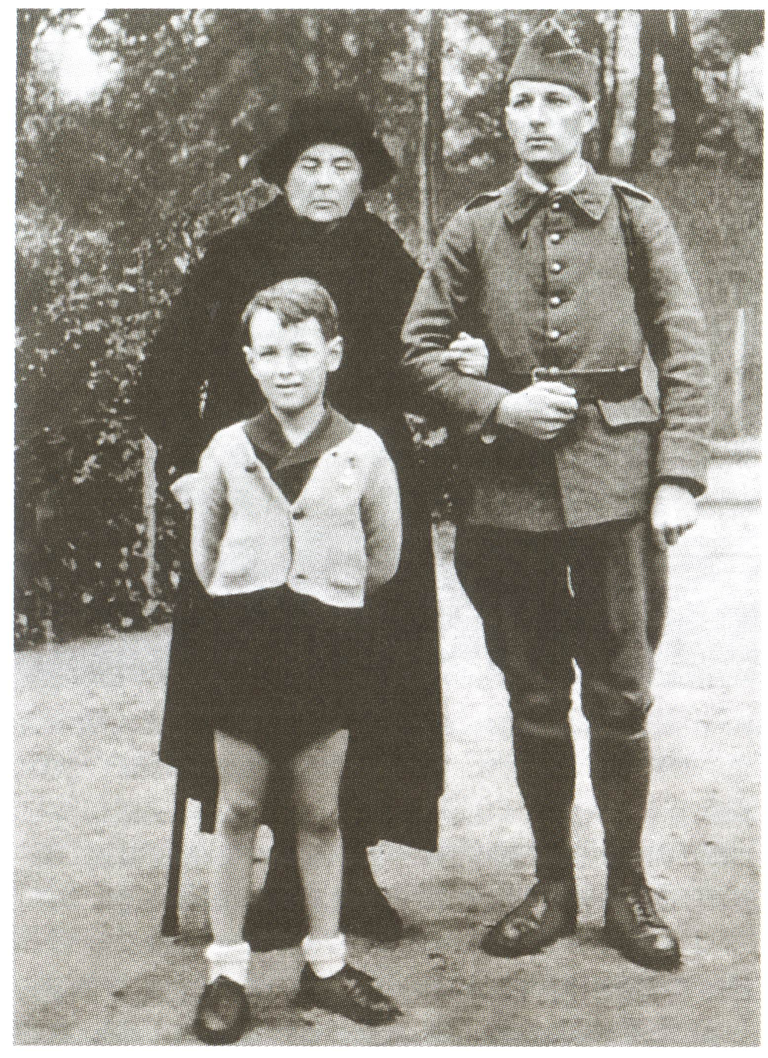 Вдова А.В. Колчака Софья Федоровна, сын Ростислав в форме французского офицера, внук Саша. 1939 год